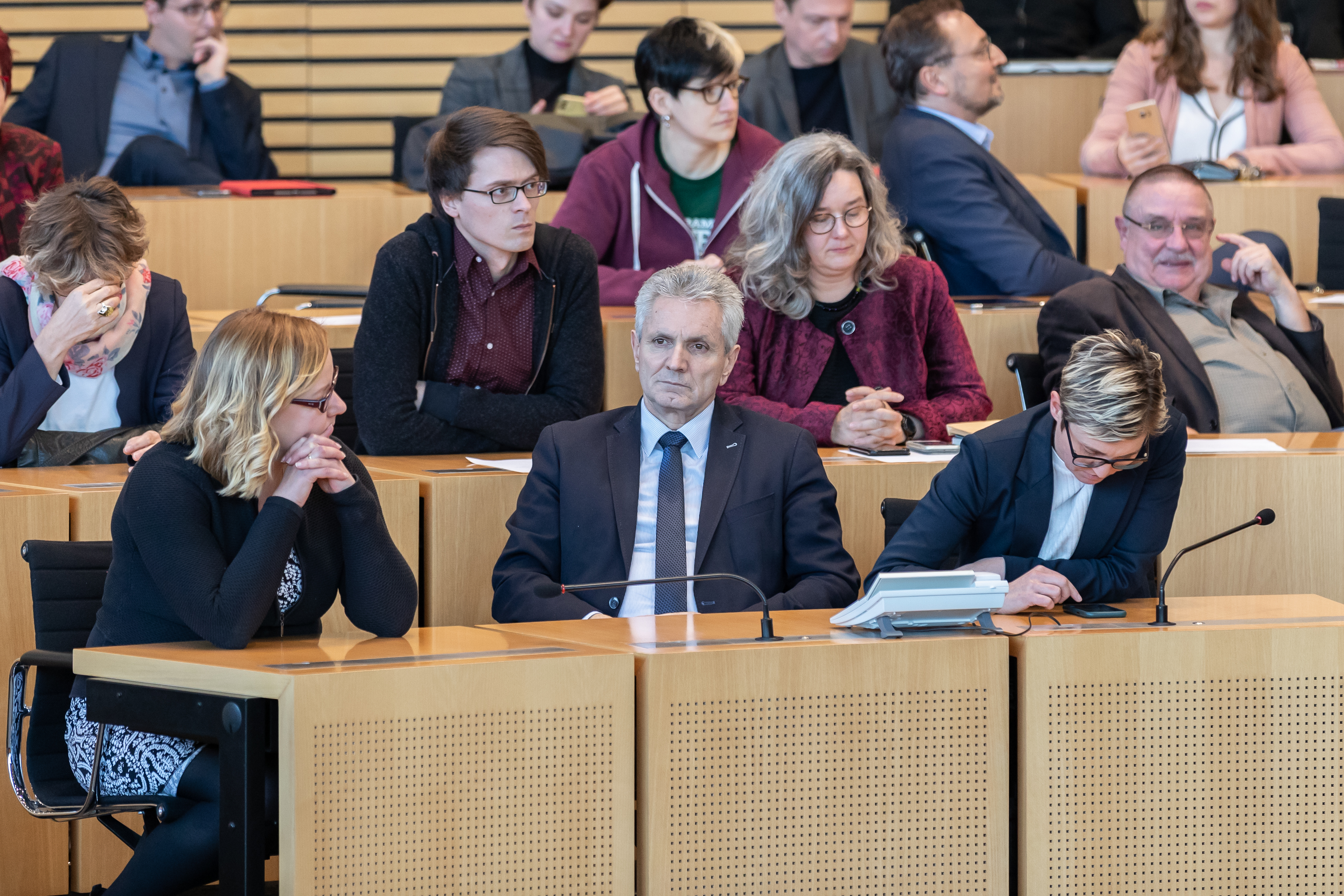 Thüringer Landtag, Wahl des Ministerpräsidenten: entsetzte Gesichter bei der Fraktion Die Linke bei der Antrittsrede von Thomas L. Kemmerich (FDP, Landes- und Fraktionsvorsitzender in Thüringen)